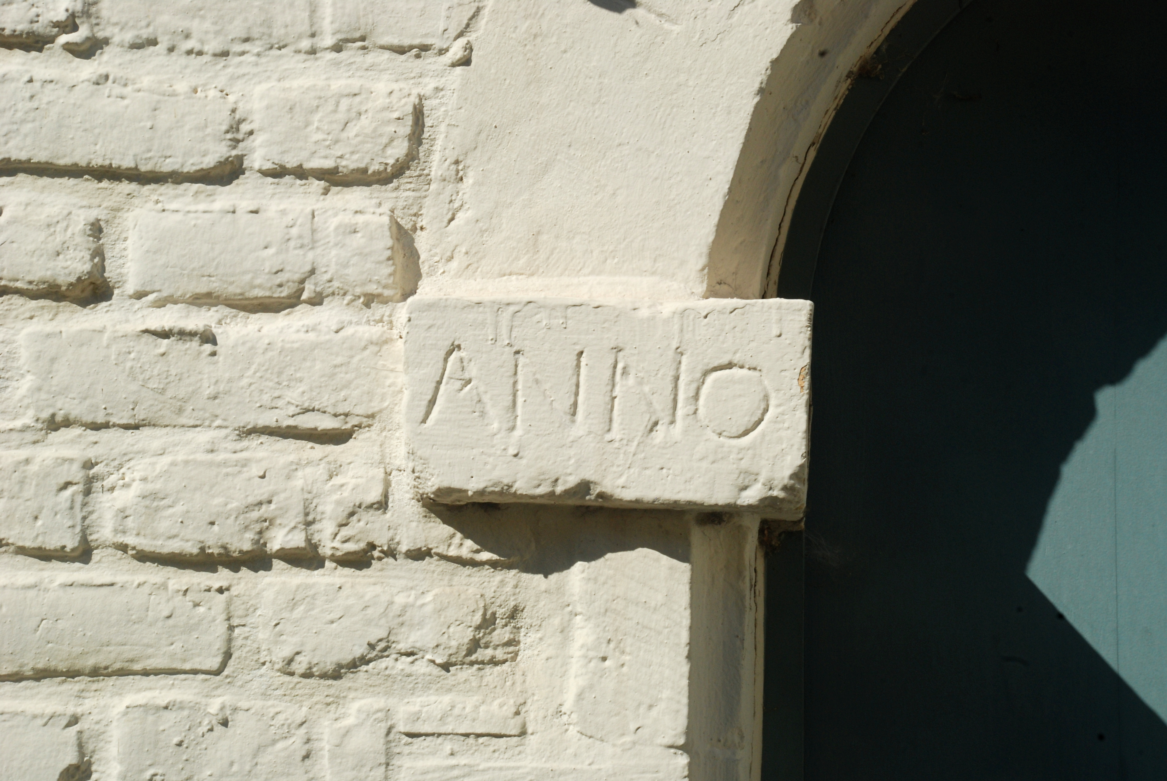 België - Leuven - Klein Begijnhof - Huis Sint-Job (n° 25)